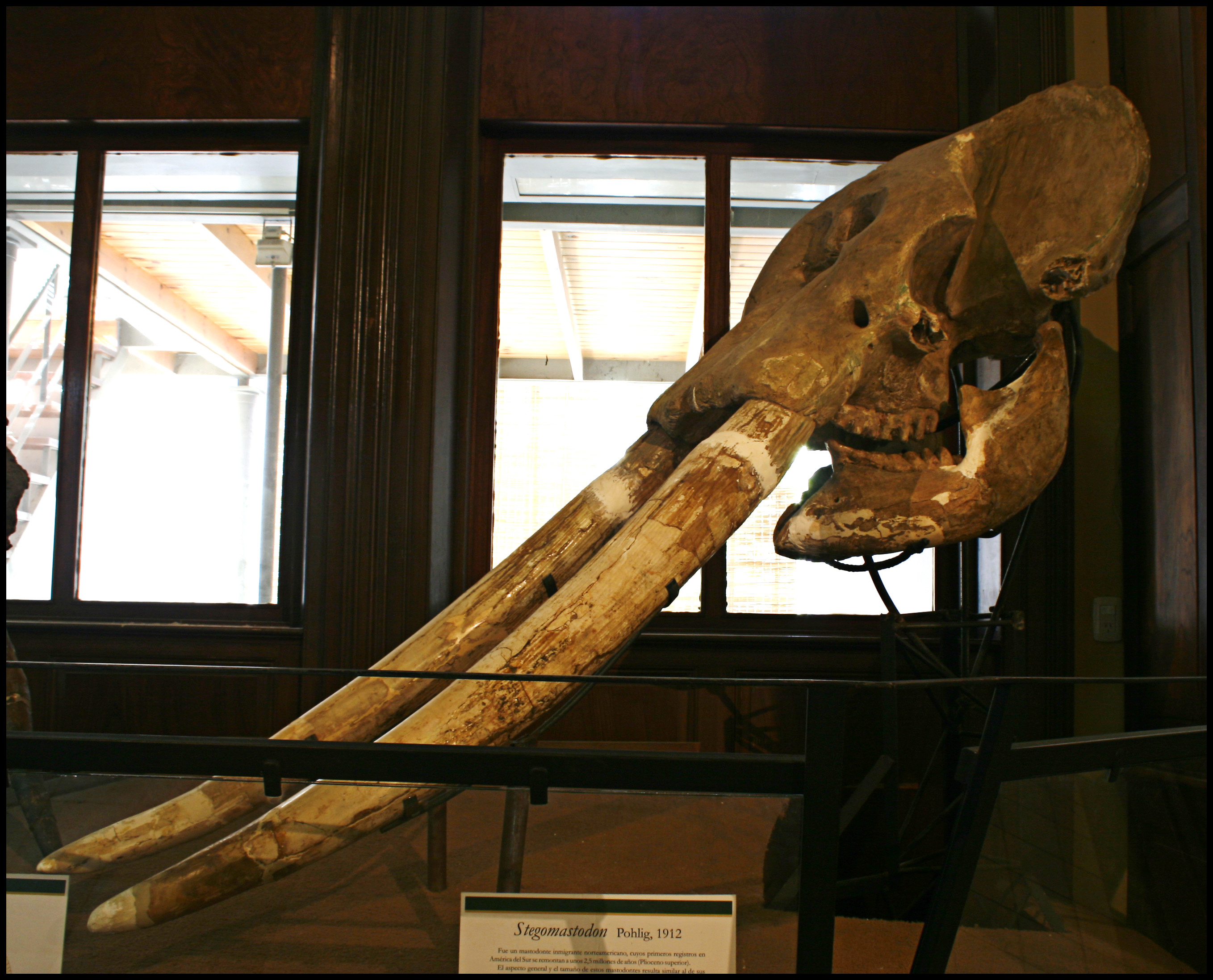 Museo de Ciencias Naturales de La Plata - Argentina